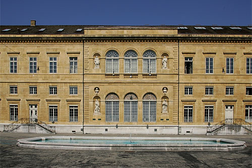 Bibliothèque à Neuchâtel